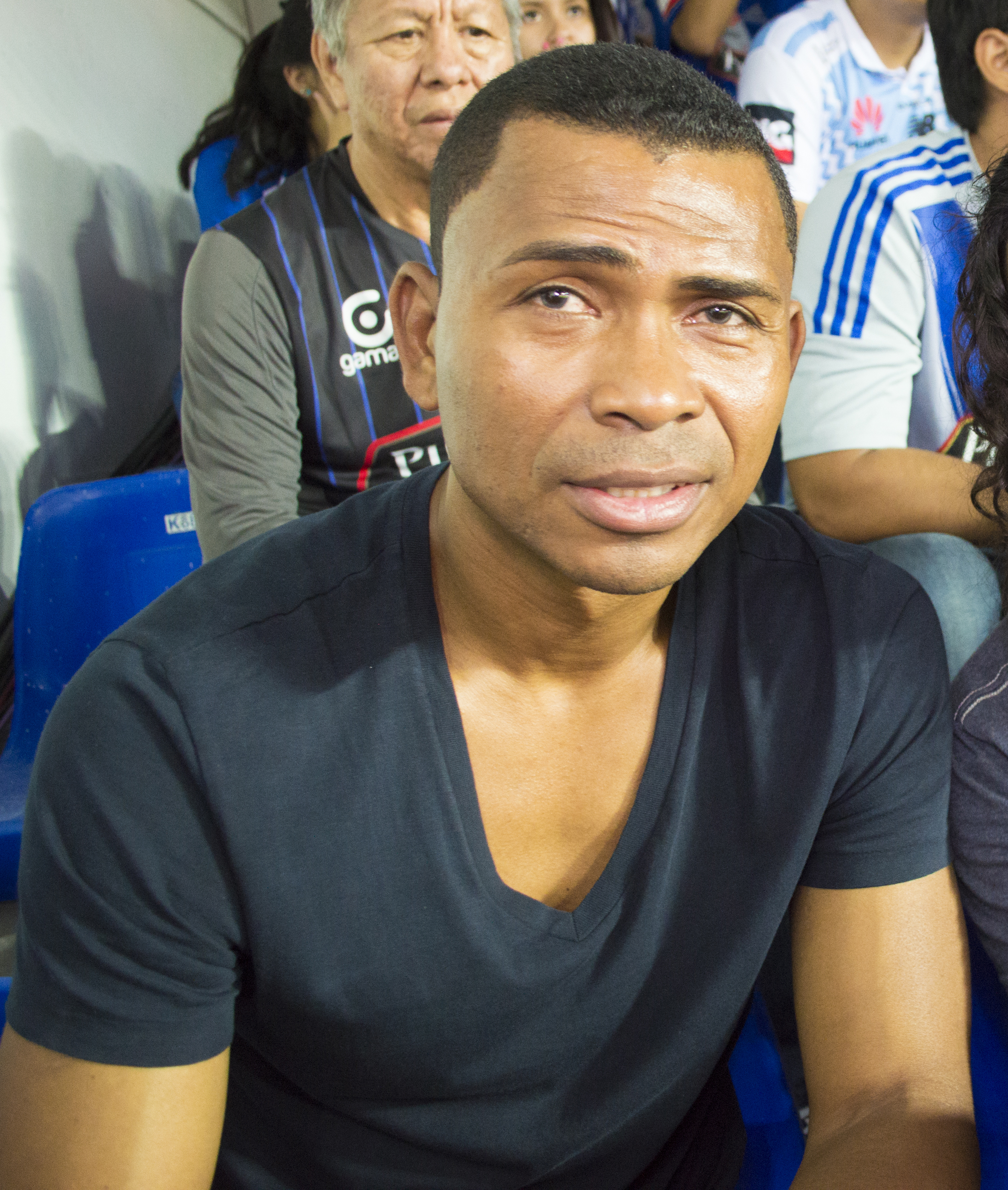 Iván Hurtado, fútbolista ecuatoriano, en 2017.